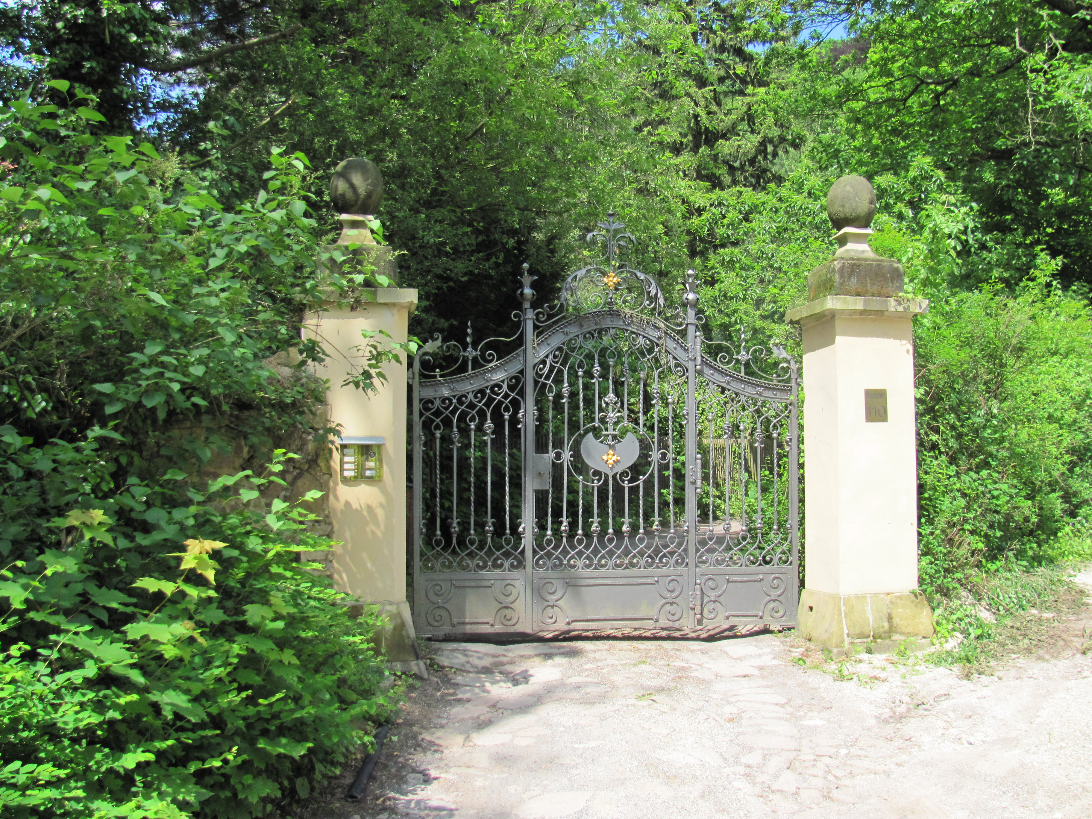 Radebeul Jägerberg gesamt Haupteinfahrt